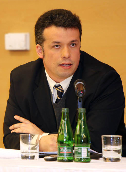 El economista chileno Óscar Landerretche Moreno durante la intervención de Eduardo Frei Ruiz-Tagle en el Instituto Chileno de Administración Racional de Empresas (ICARE) en el marco de la campaña presidencial, septiembre de 2009